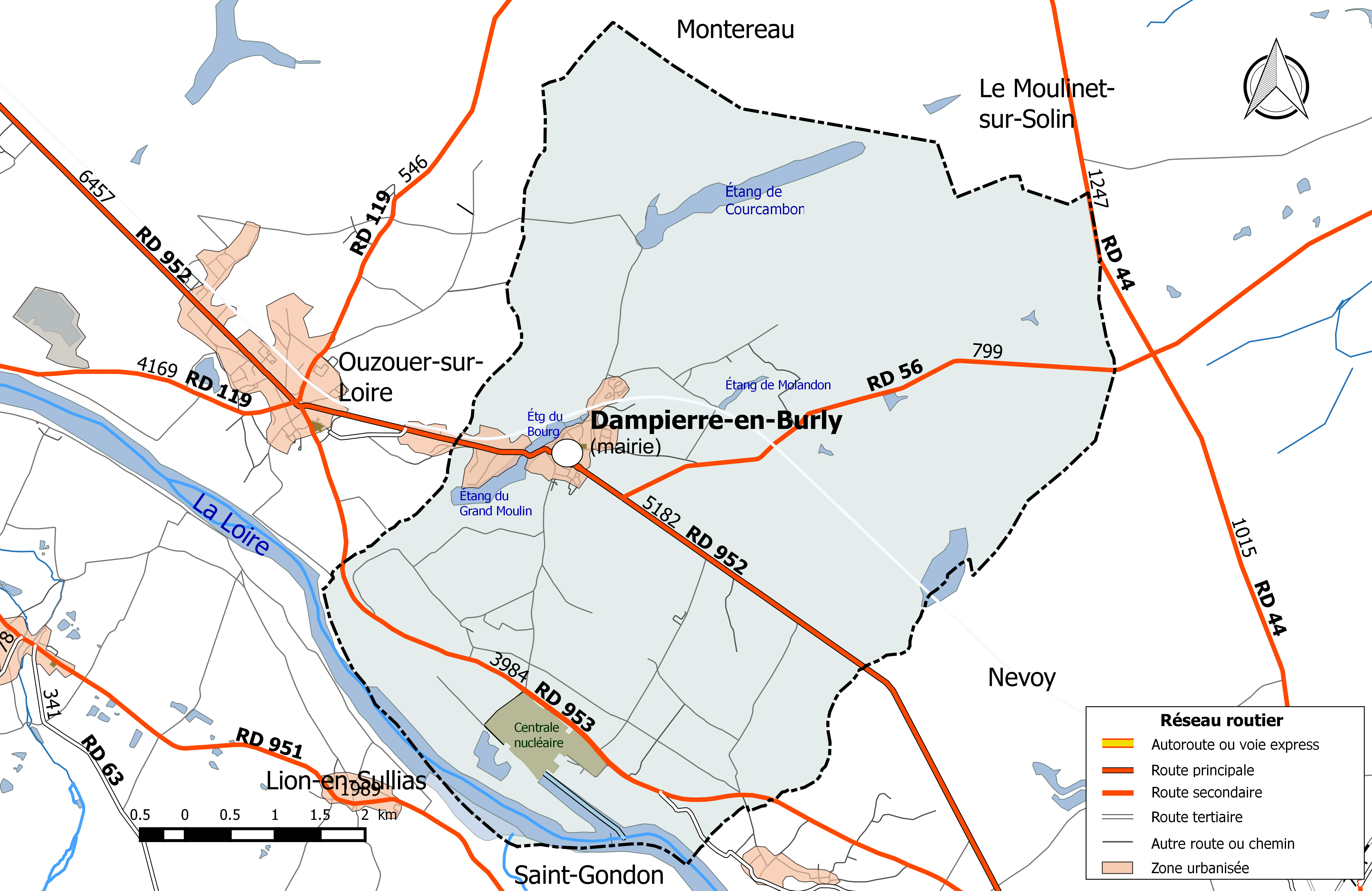 Carte du réseau routier de la commune de Dampierre-en-Burly.